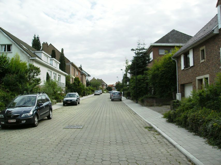 Av Martinets Auderghem Belgium